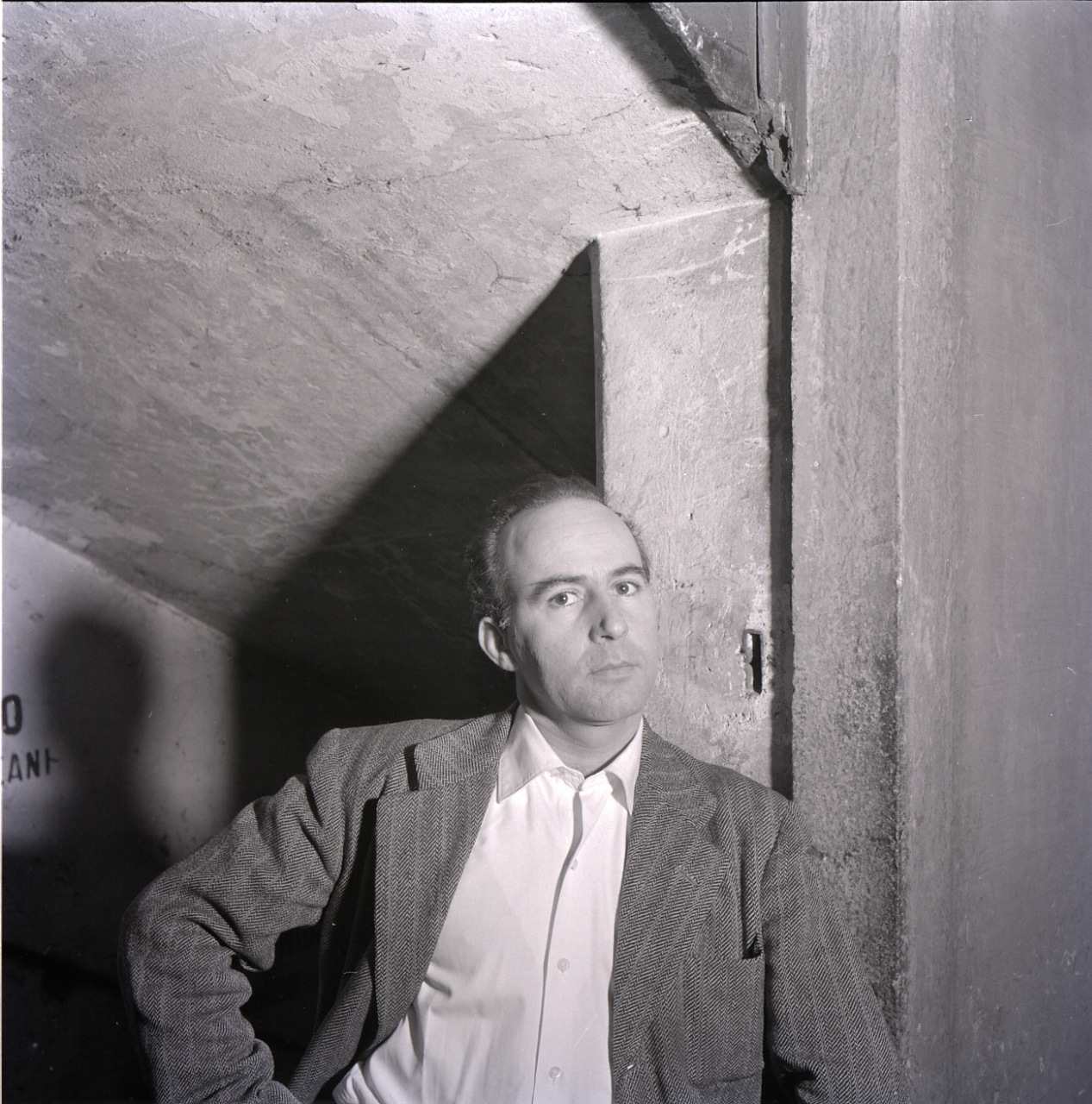 Servizio fotografico : Italia, 1982 / Paolo Monti. - Buste: 10, Fototipi: 10 : Negativo b/n, gelatina bromuro d'argento/ pellicola ; 6x6. - ((Serie costituita da 10 buste di carta, tenute insieme da graffetta, identificate con i nn.: R4479, R4480, R4481, R4482, R4483, R4484, R4485, R4486, R4487, R4488. - Sulla busta 4479: "Savelli"